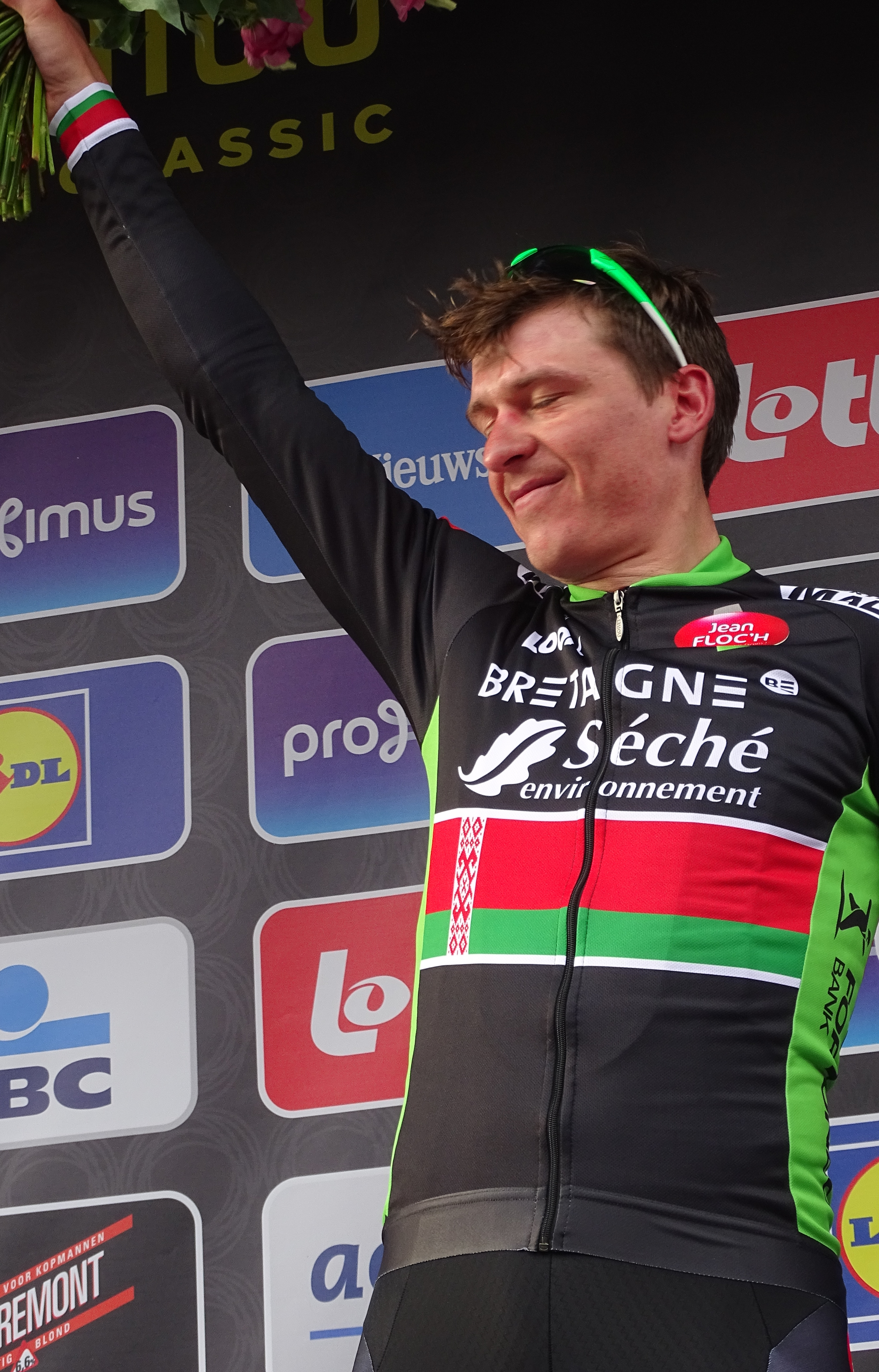 Reportage réalisé le mercredi 8 avril à l'occasion de l'arrivée du Grand Prix de l'Escaut 2015 à Schoten, Belgique.